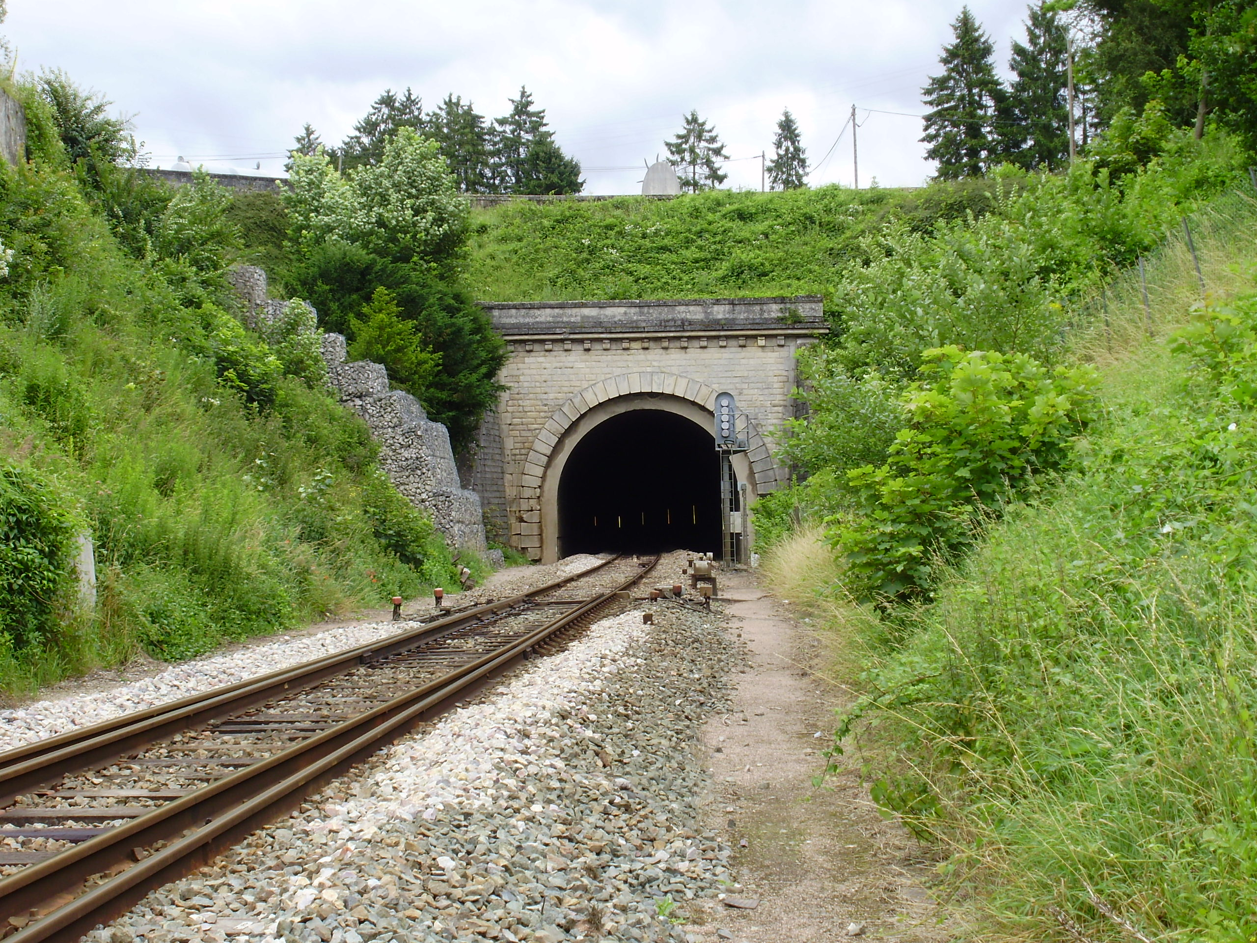 Tunnel de Vierzy, Aisne, France : entrée sud-ouest du tunnel, à Vierzy. Le monument en souvenir des victimes de l'effondrement du tunnel, survenu le 16 juin 1972, est au-dessus de l'entrée.